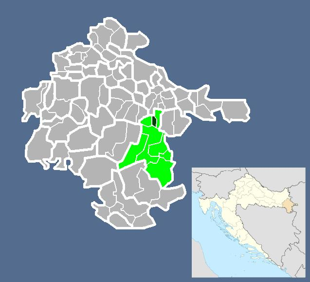 Српски (ћирилица): Насеље Винковачки Бановци у Општини Нијемци.